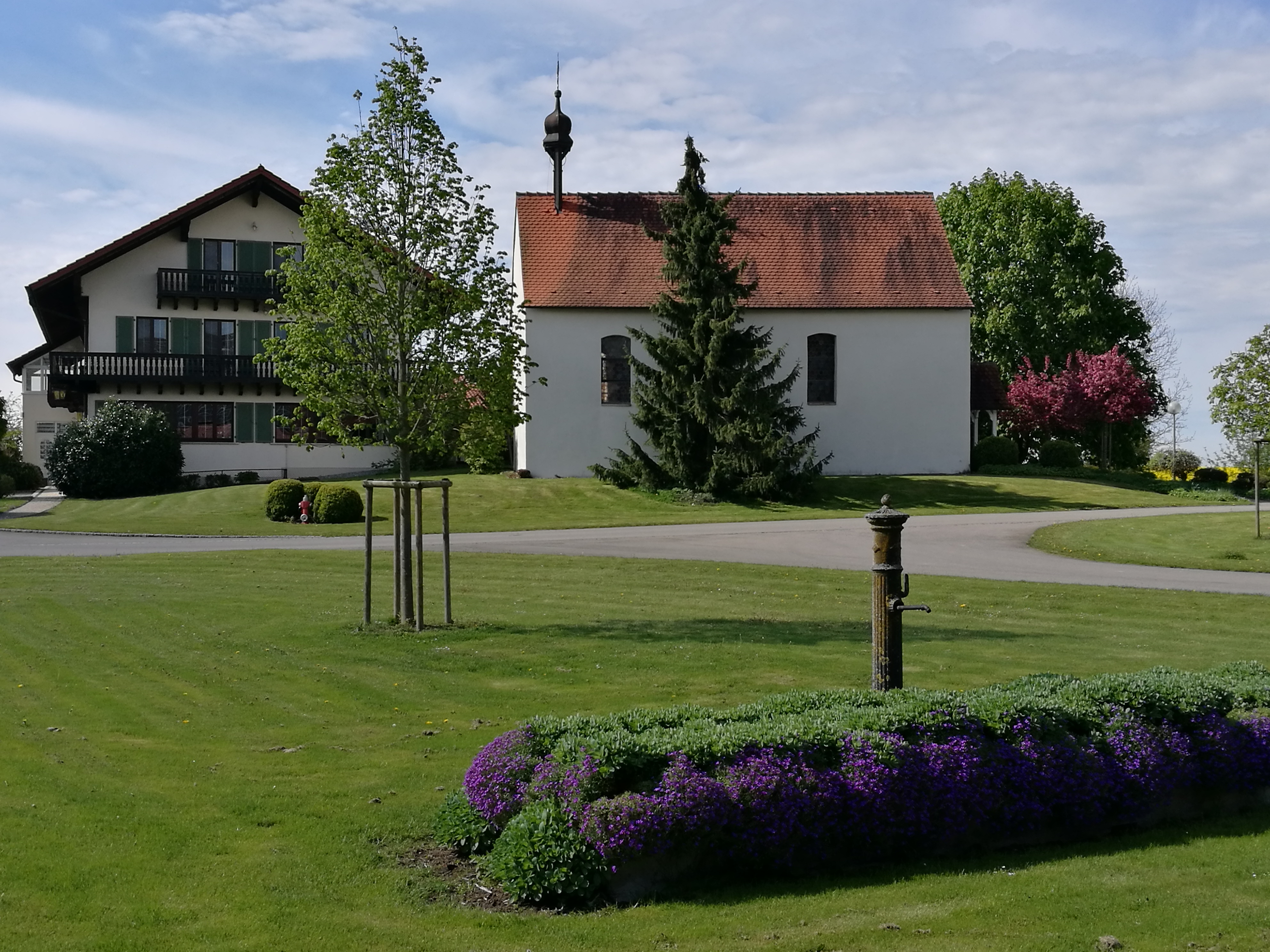 Deutschland (D) - Baden-Württemberg (BW) - Landkreis Konstanz (KN) - Mühlingen - Madachhof: Wohnhaus und "Kapelle St. Otmar"